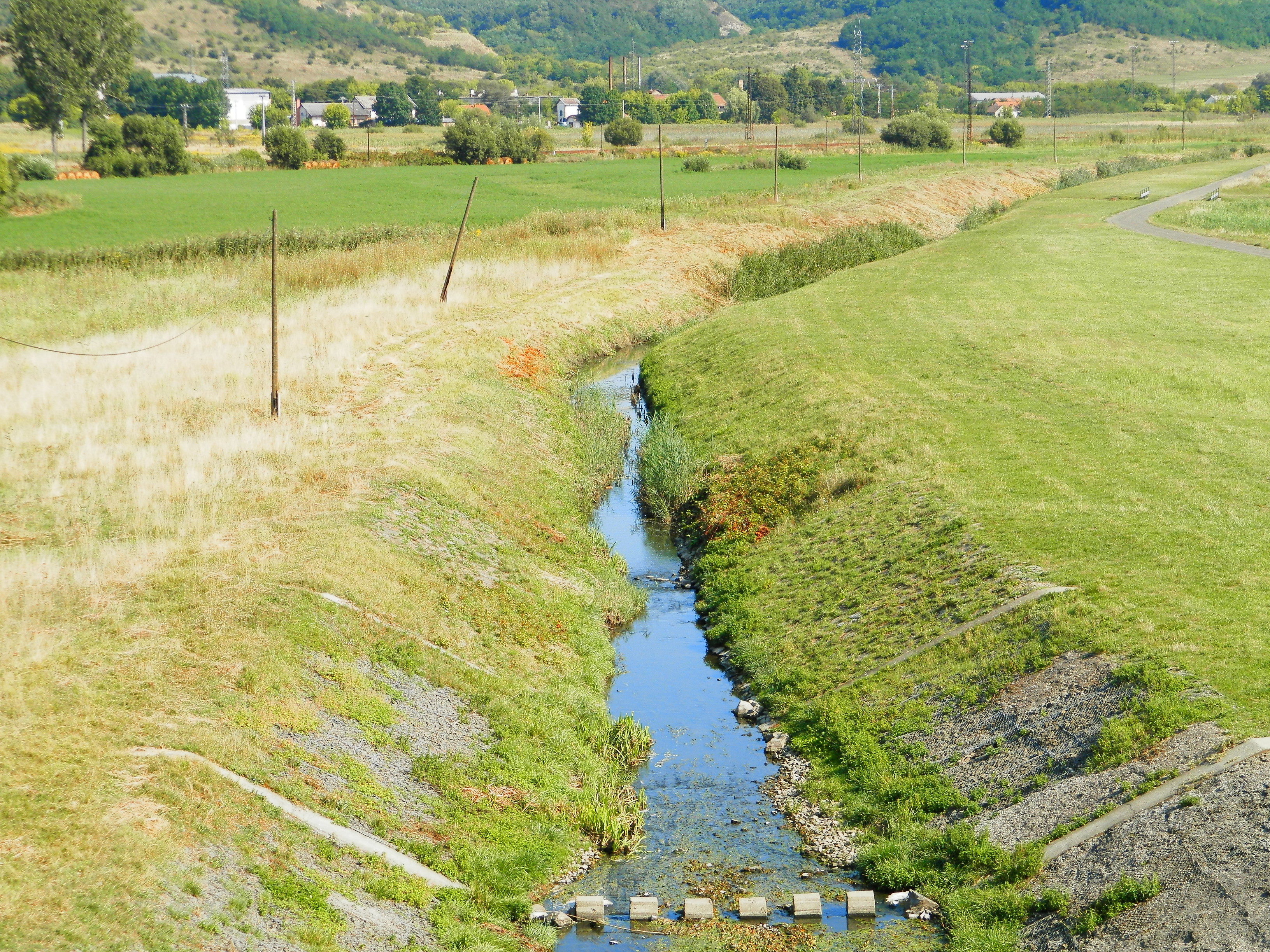 A Tarján patak egy szakasza a kisterenyei szükségtározó gátjáról nézve